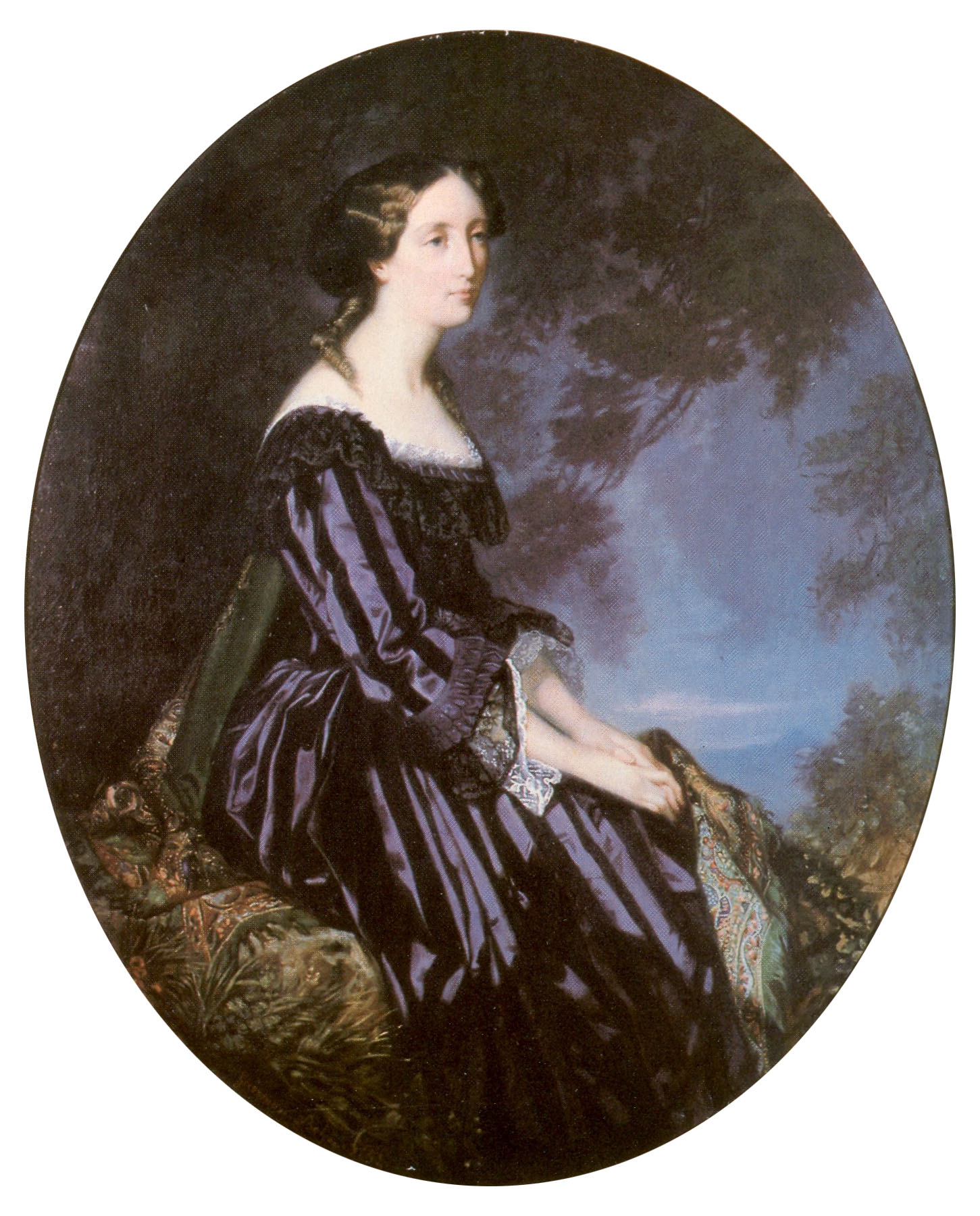 Königin Olga von Württemberg (1822-1892) als Kronprinzessin. Gemahlin König Karls